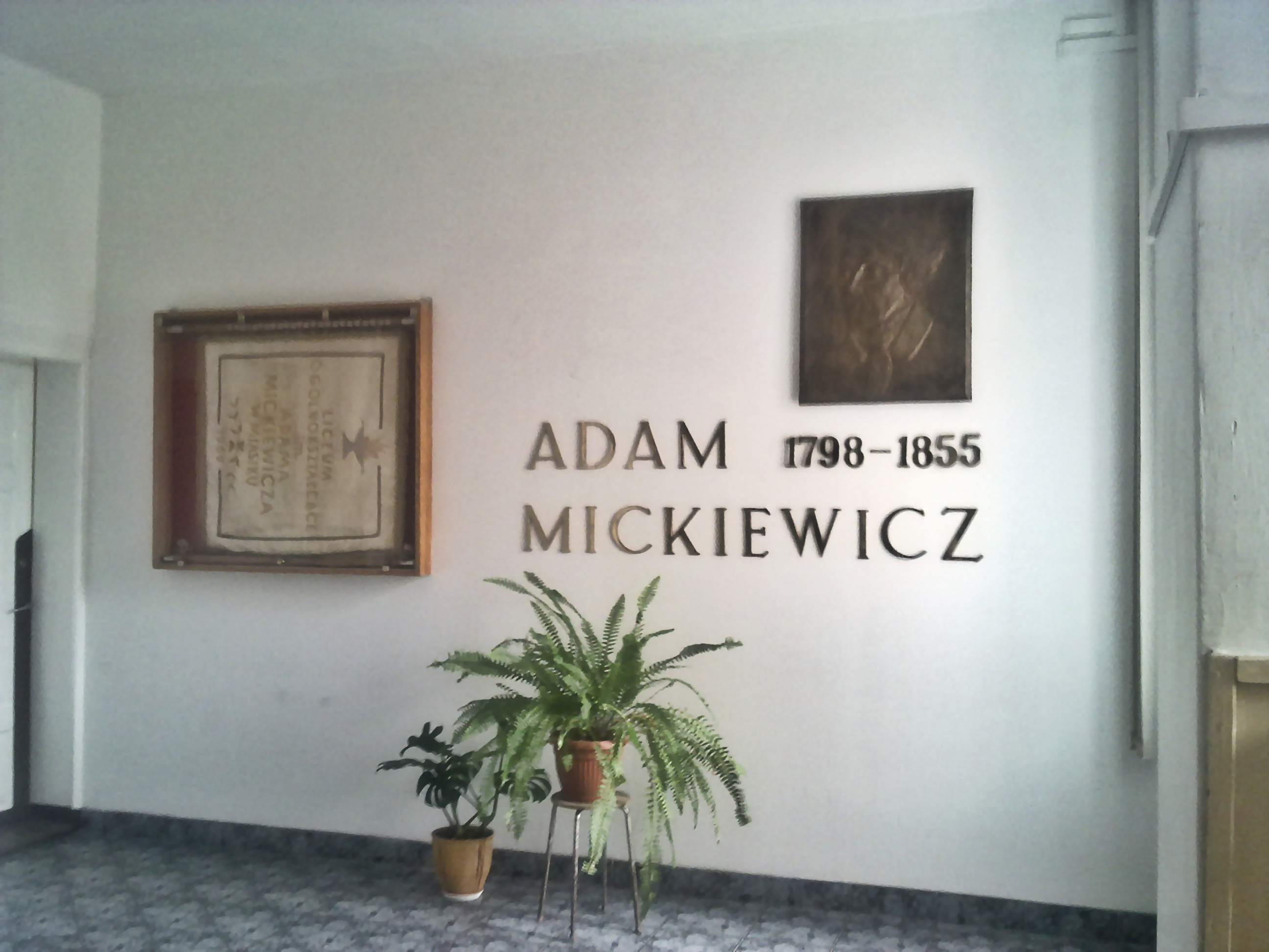 Liceum Ogólnokształcące im. Adama Mickiewicza w Miastku Sztandar szkoły oraz ściana patrona